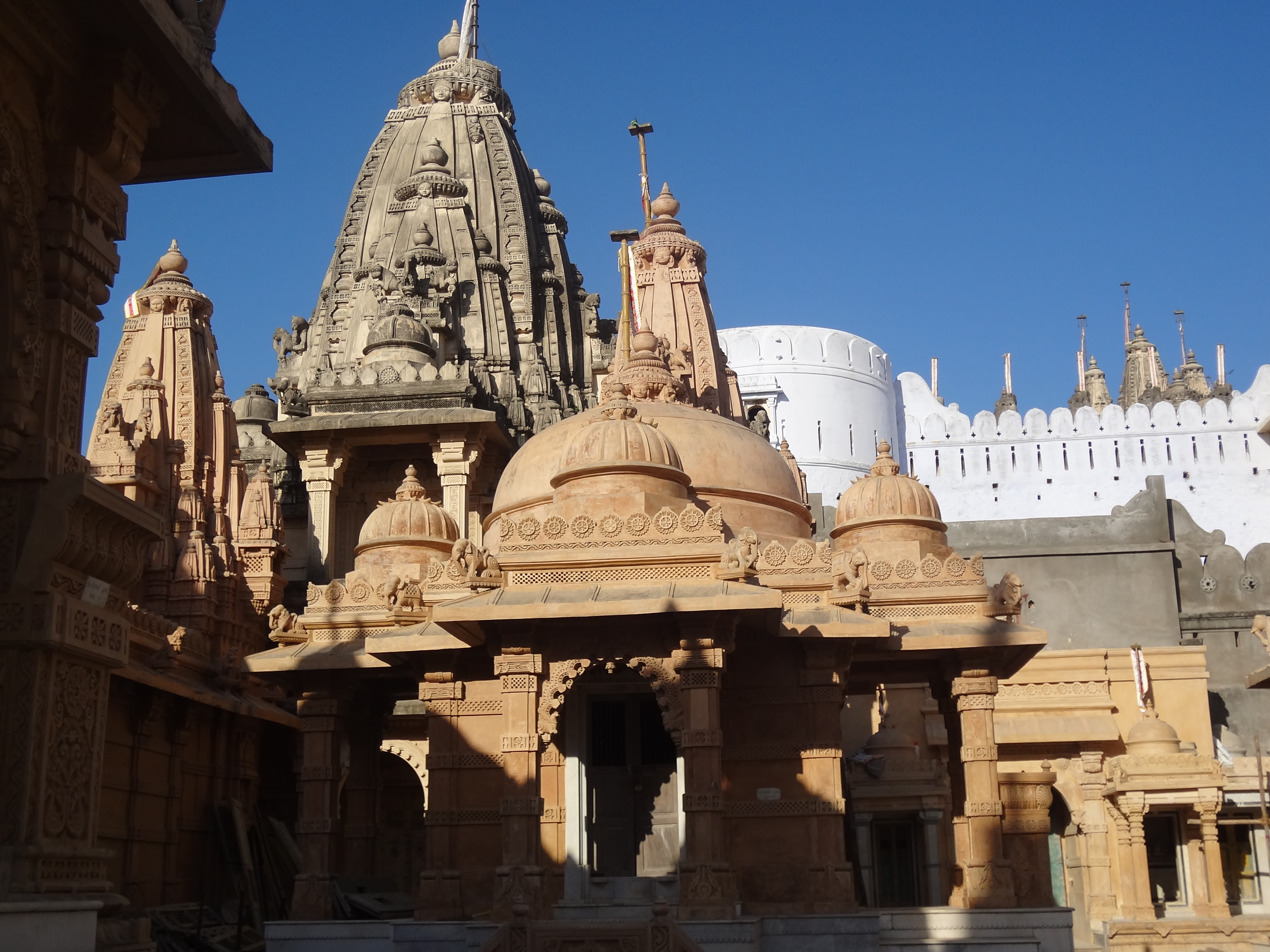 Jain Temple, Palitana